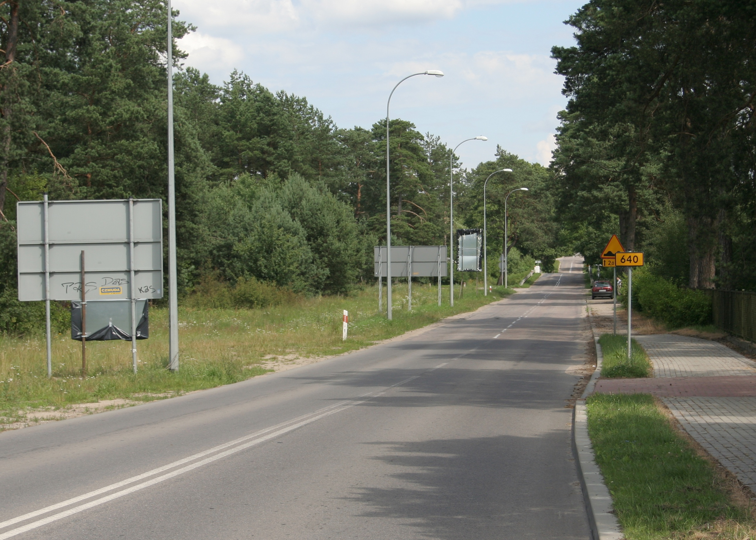 droga wojewódzka nr 640 - początek drogi w Siemiatyczach